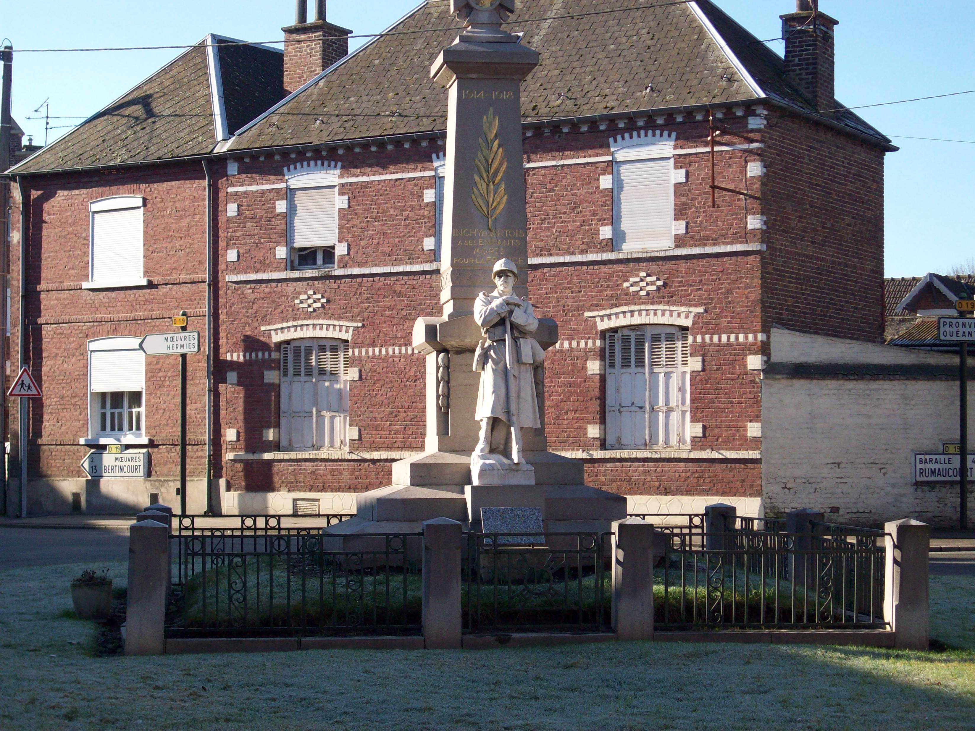 Photo du monument aux morts